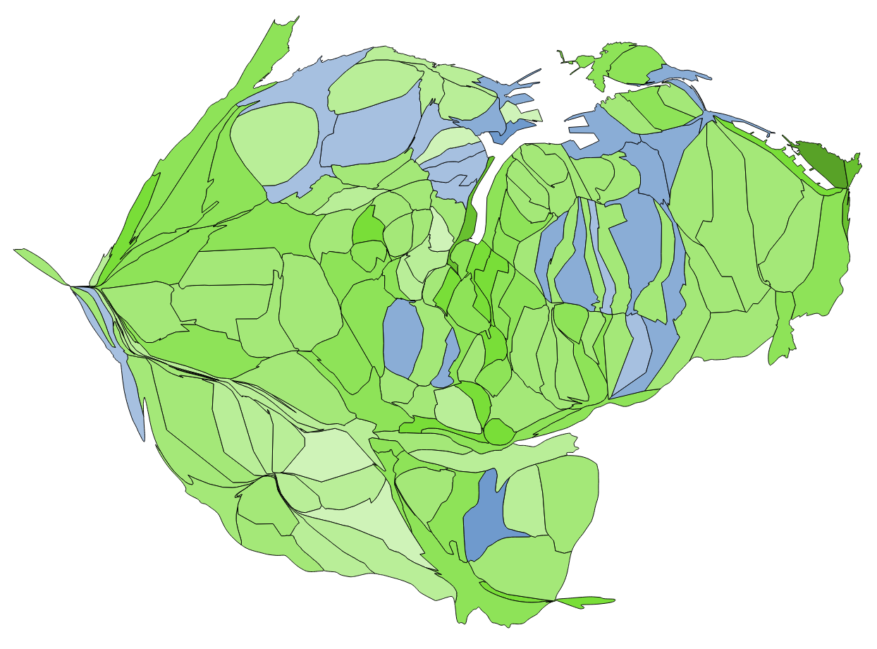 顏色對照表